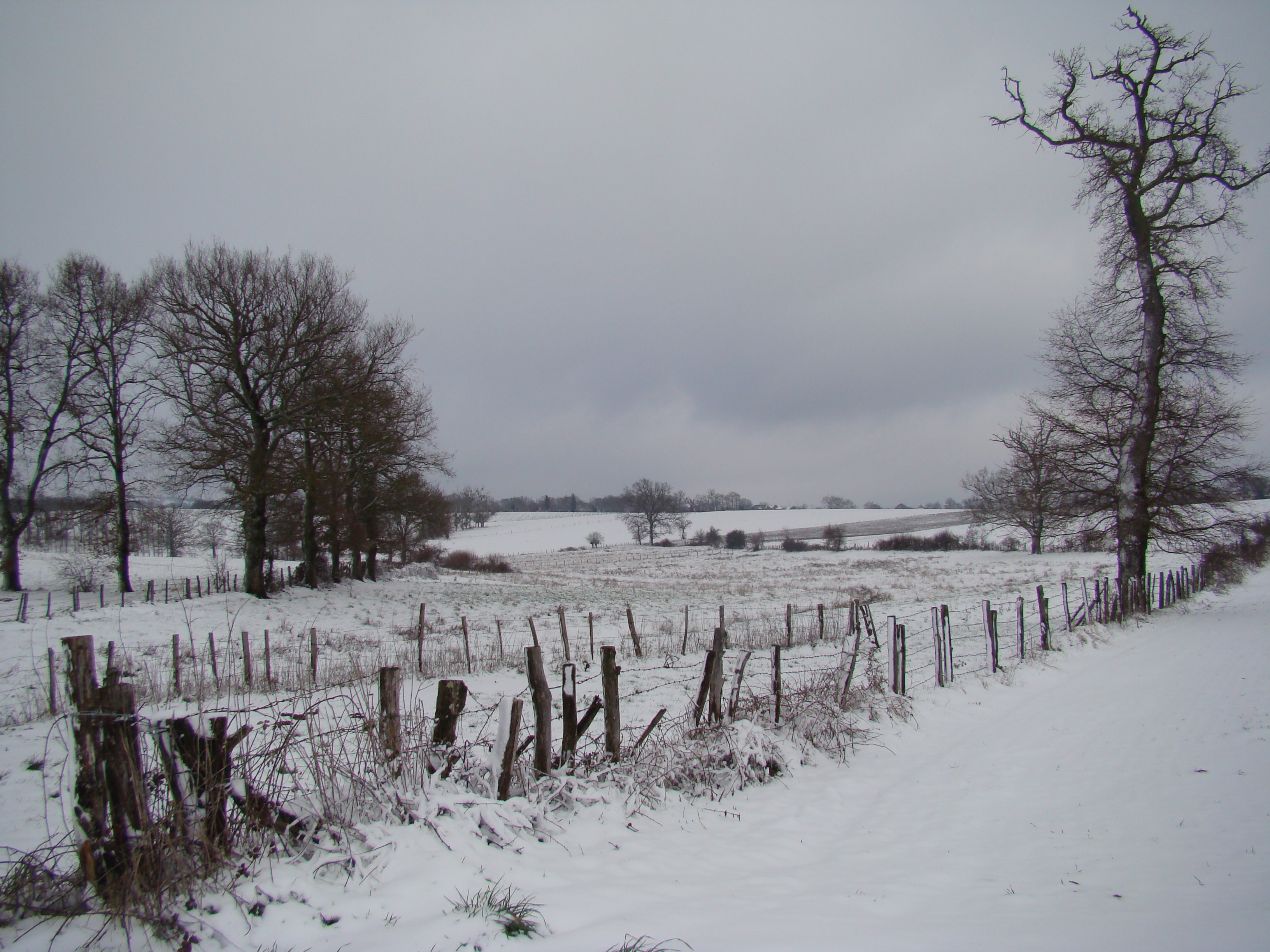 Route de Gaffatou